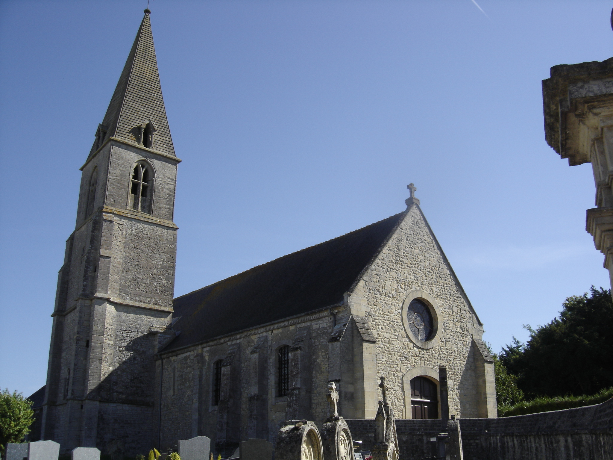 Clocher, façade nord et portail occidental de l'église